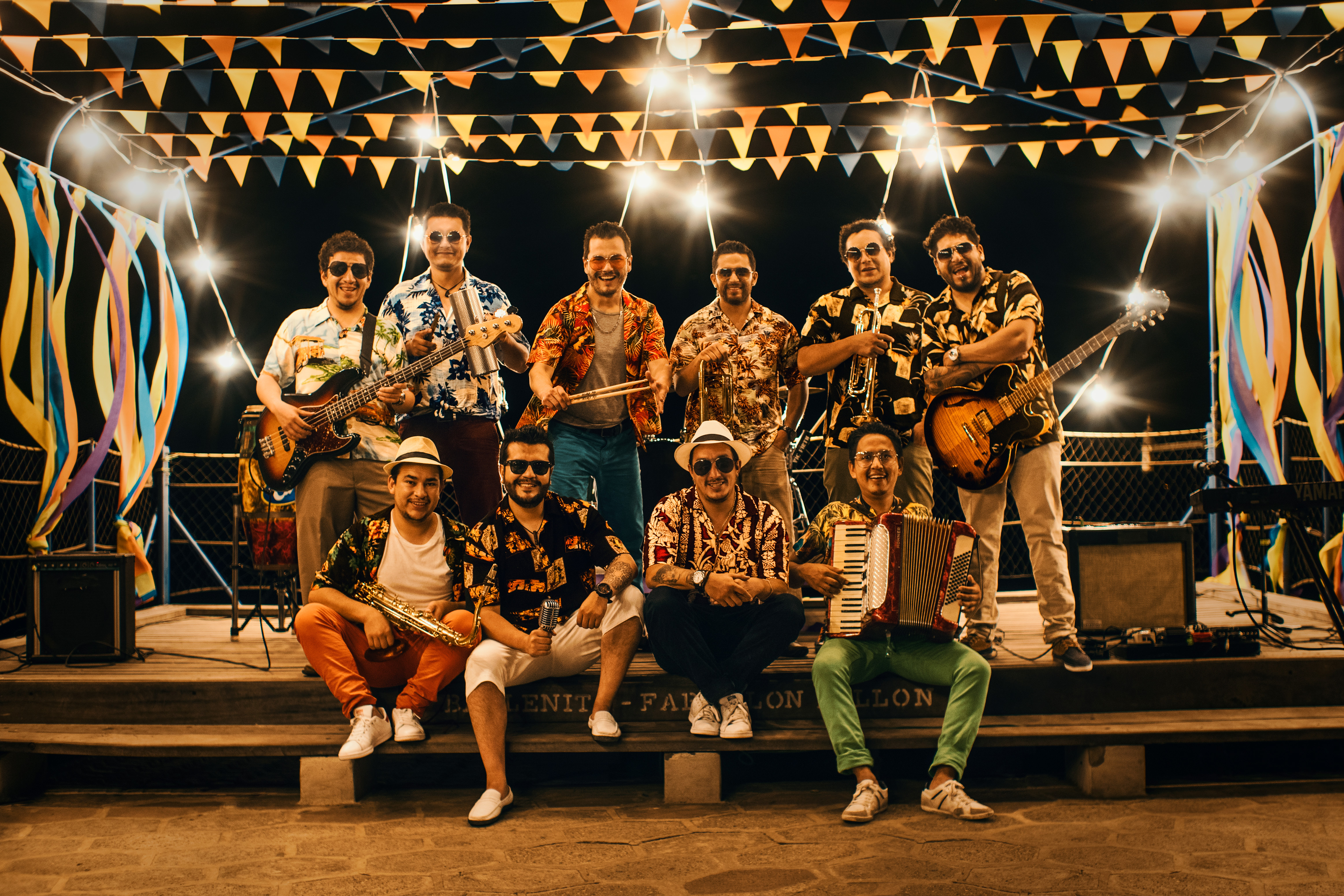 Foto de la Campaña IsBack de la agrupación ecuatoriana Papá Changó